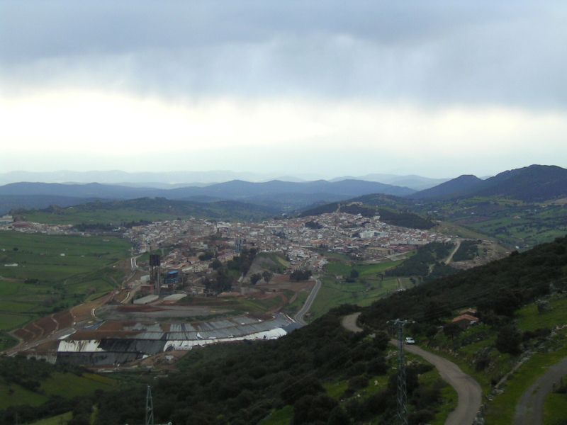 Almadén desde la ermita de la Virgen del Castillo